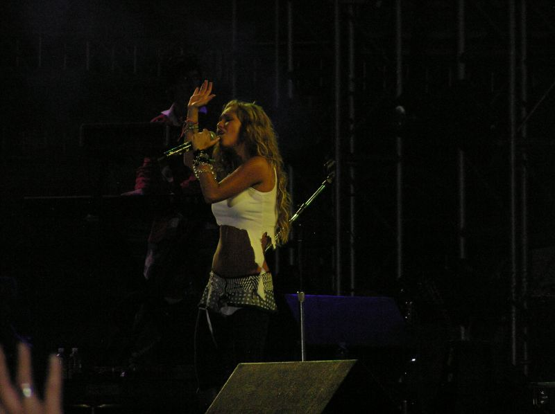 Anahí durante um show no Reventon Super Estrella 2006.